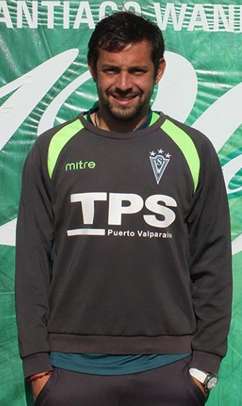 Edición de la fotografía "MatiasMier.jpg", que muestra al jugador de fútbol Matías Mier.